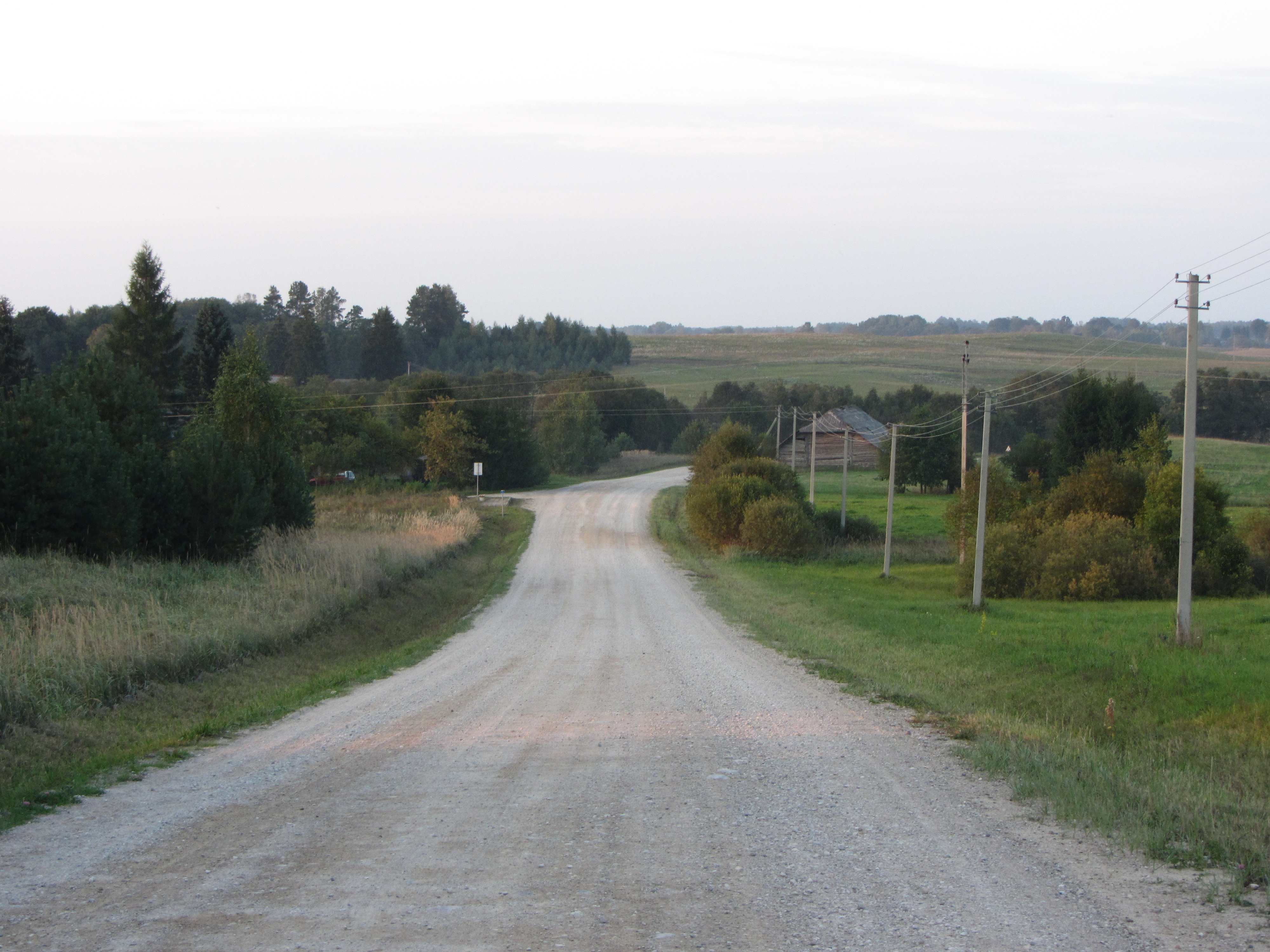 Utenos sen., Lithuania